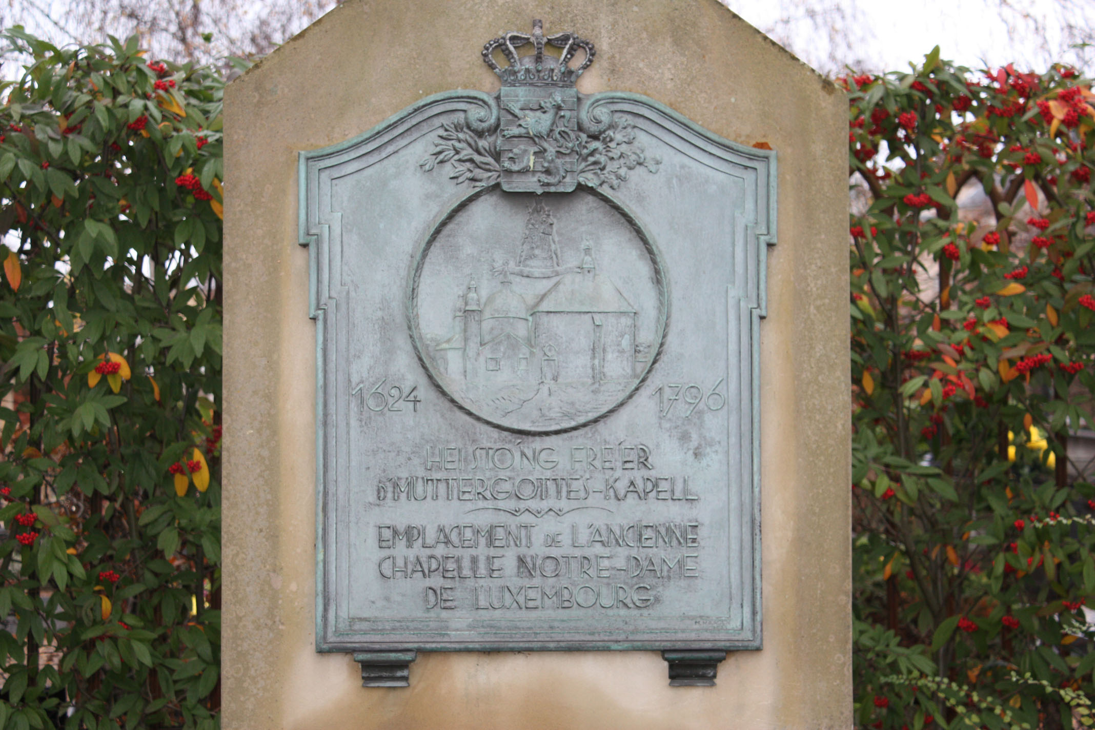 Erënnerungsplakett un di éischt Muttergotteskapell um Glacis (1628-1796)